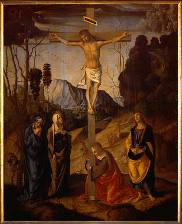 Crucifixion